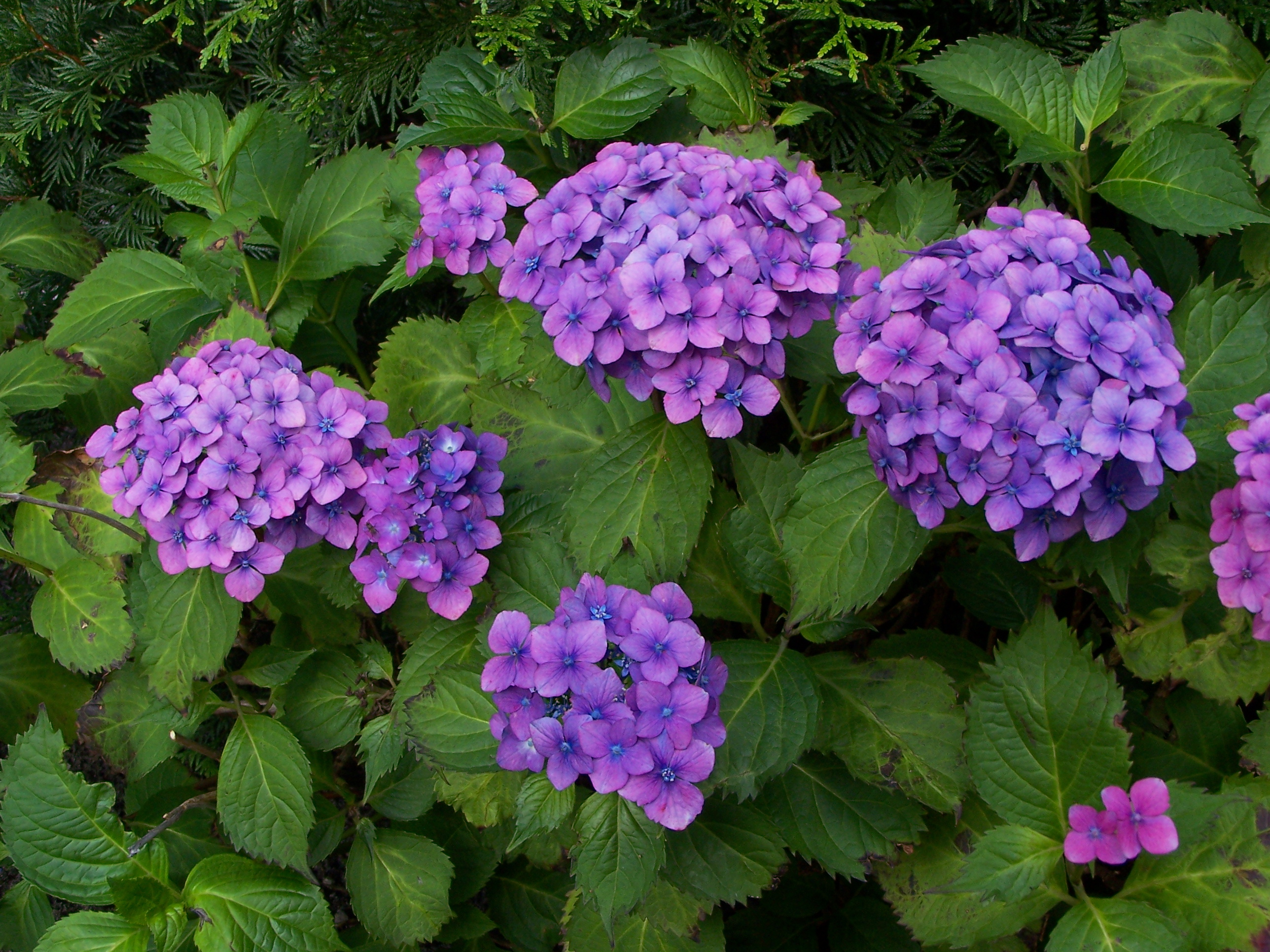 Hortensien